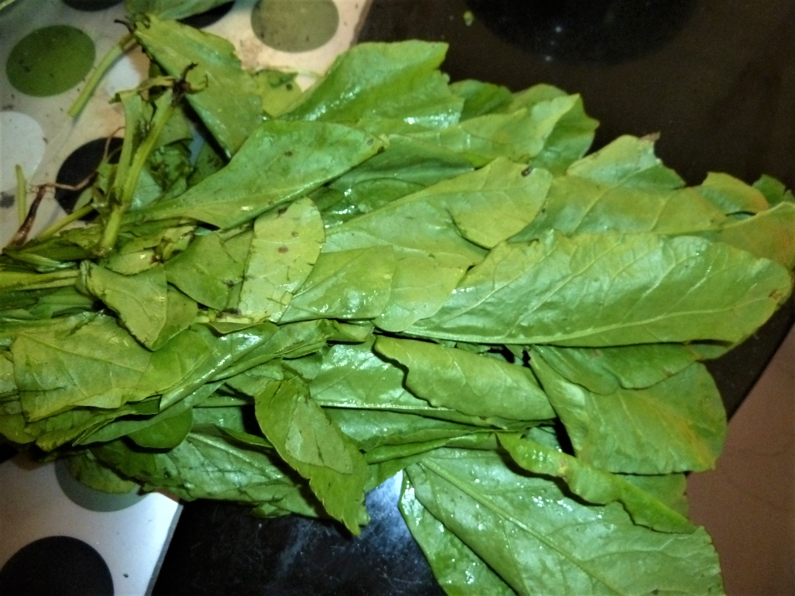 పాలకూర